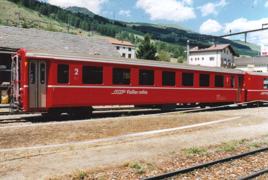 Personenwagen Typ EW2 (Einheitswagen II) der RhB am 21. Juni 2003 in Scuol-Tarasp. Aufnahme: Steffen Mokosch Lizenz: GNU FDL